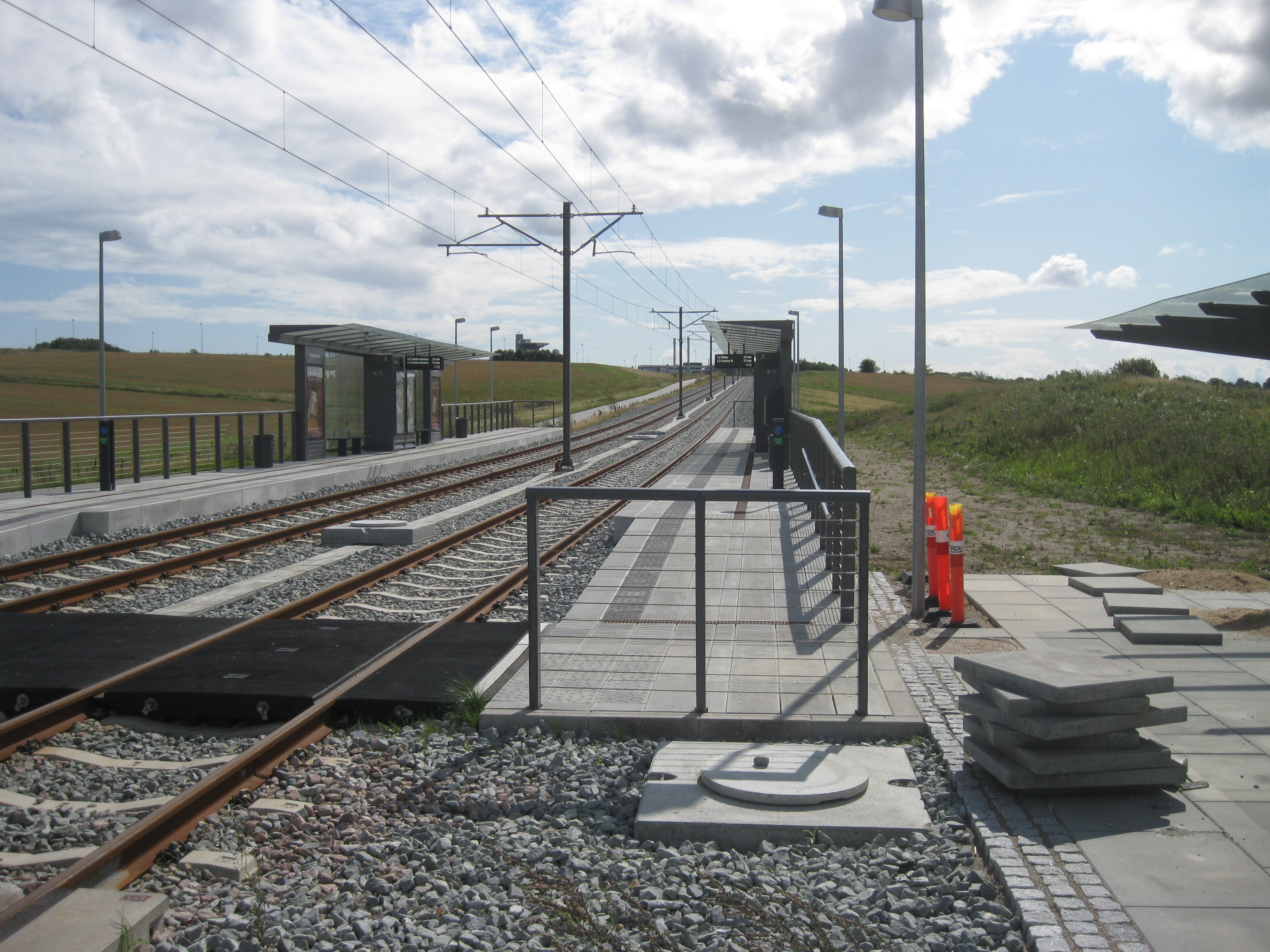 Humlehuse Station, Århus Letbane